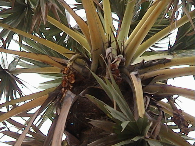 Borassus flabellifer - Inde du sud 2004